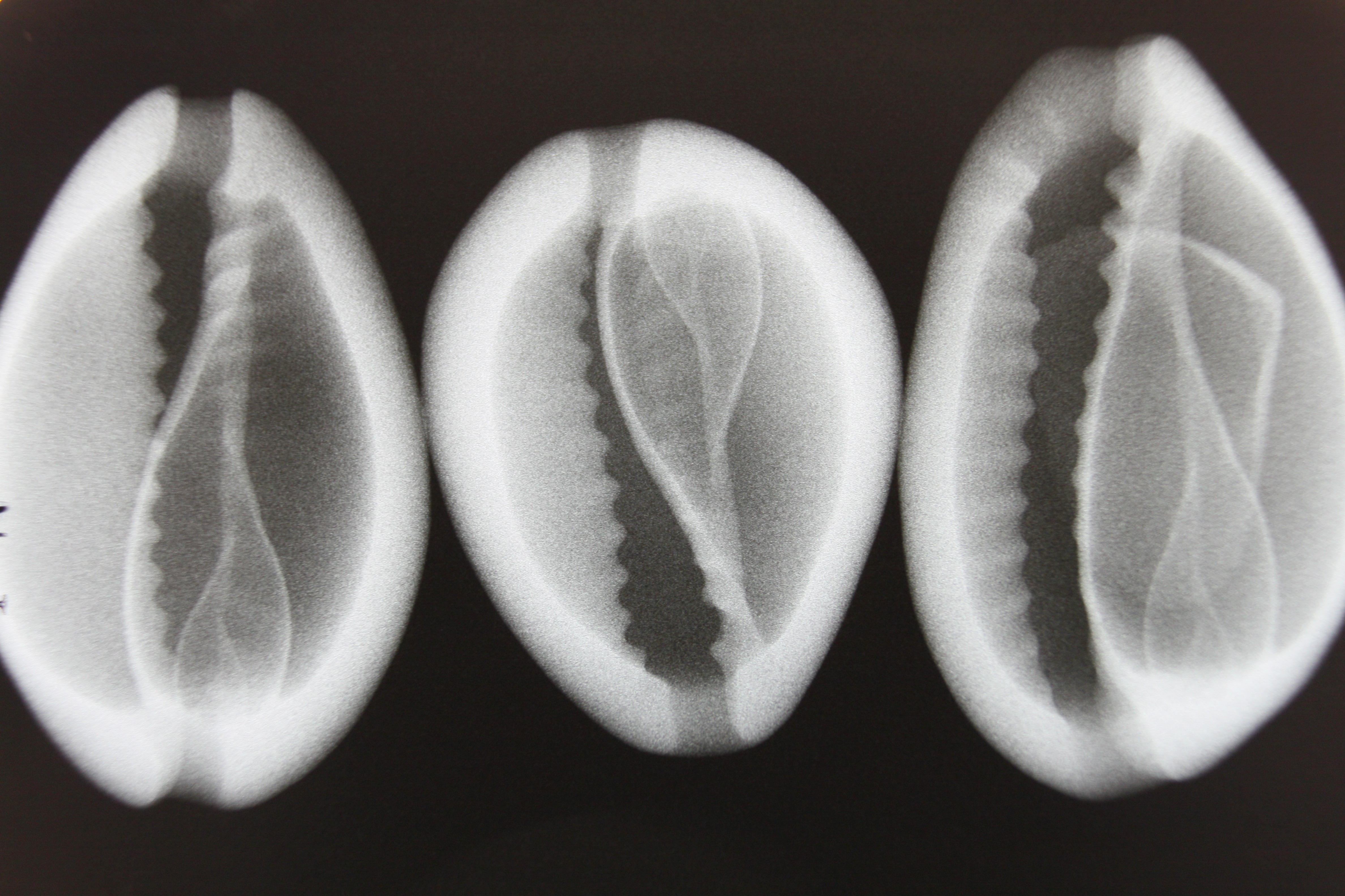 Gehäuse der Monetaria annulus (Ringkauri)), teilweise aufgefräst. Diese wurden neben der Monetaria moneta (Geldkauri) als Kaurigeld verwendet